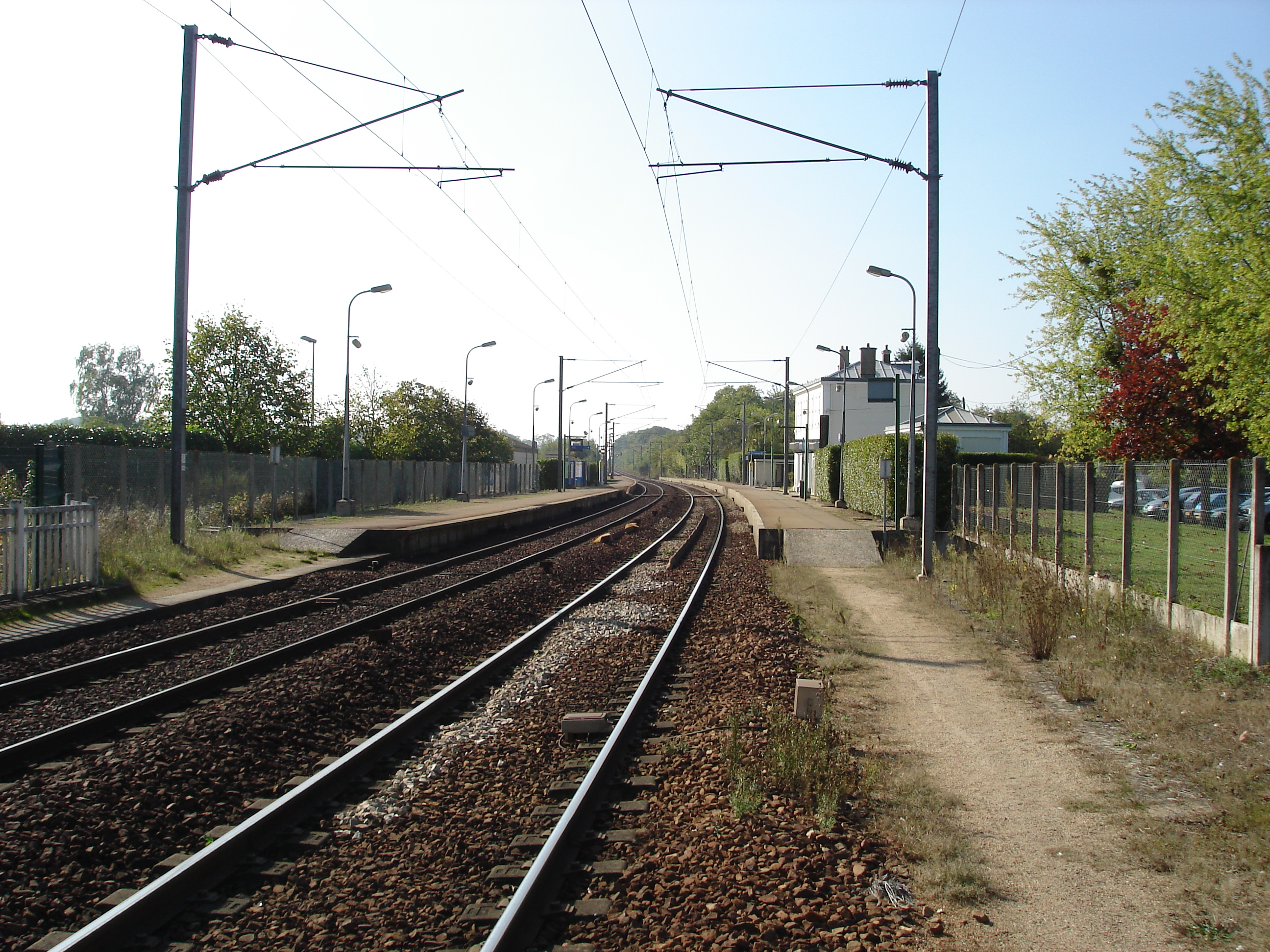 Gare de Tacoignières - Richebourg (78) : Vue générale de la gare.